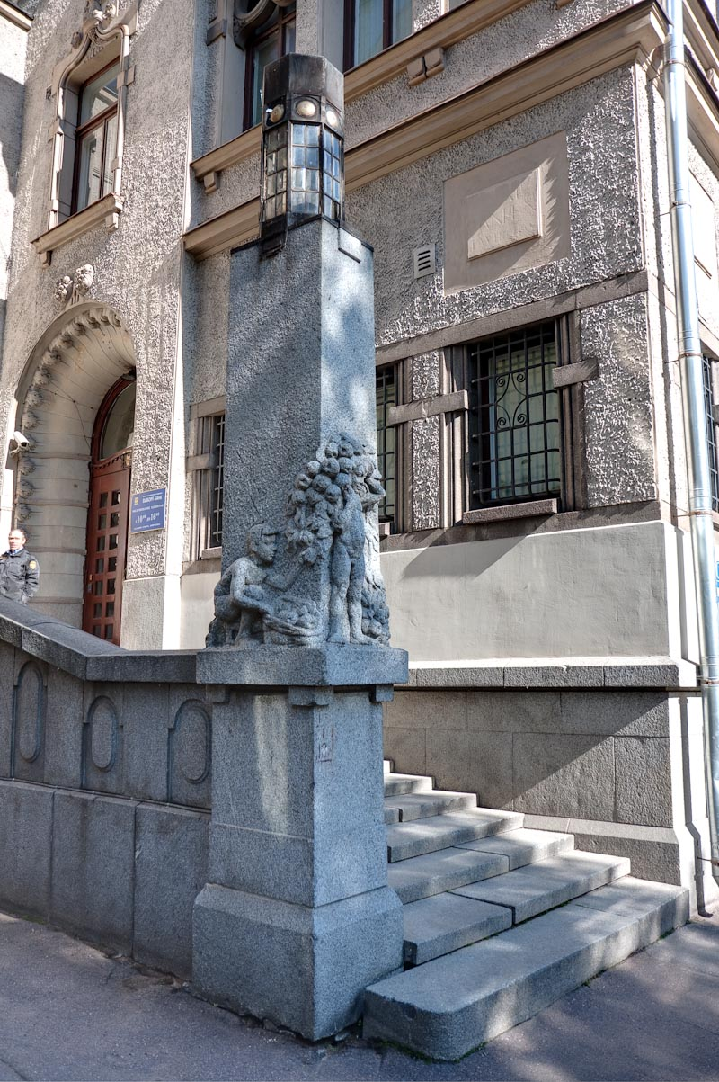 ул.Пионерская,2; 22.08.2009